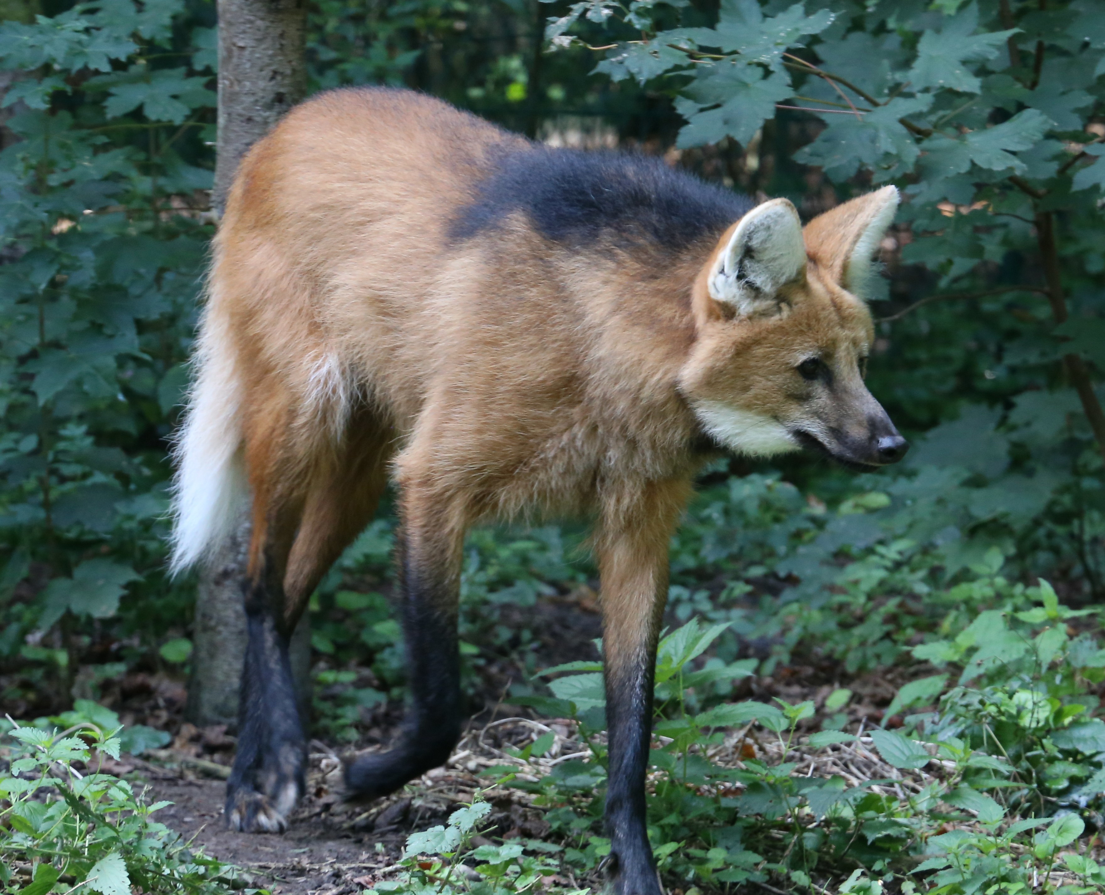 Mähnenwolf, Chrysocyon brachyurus, Zoo Augsburg